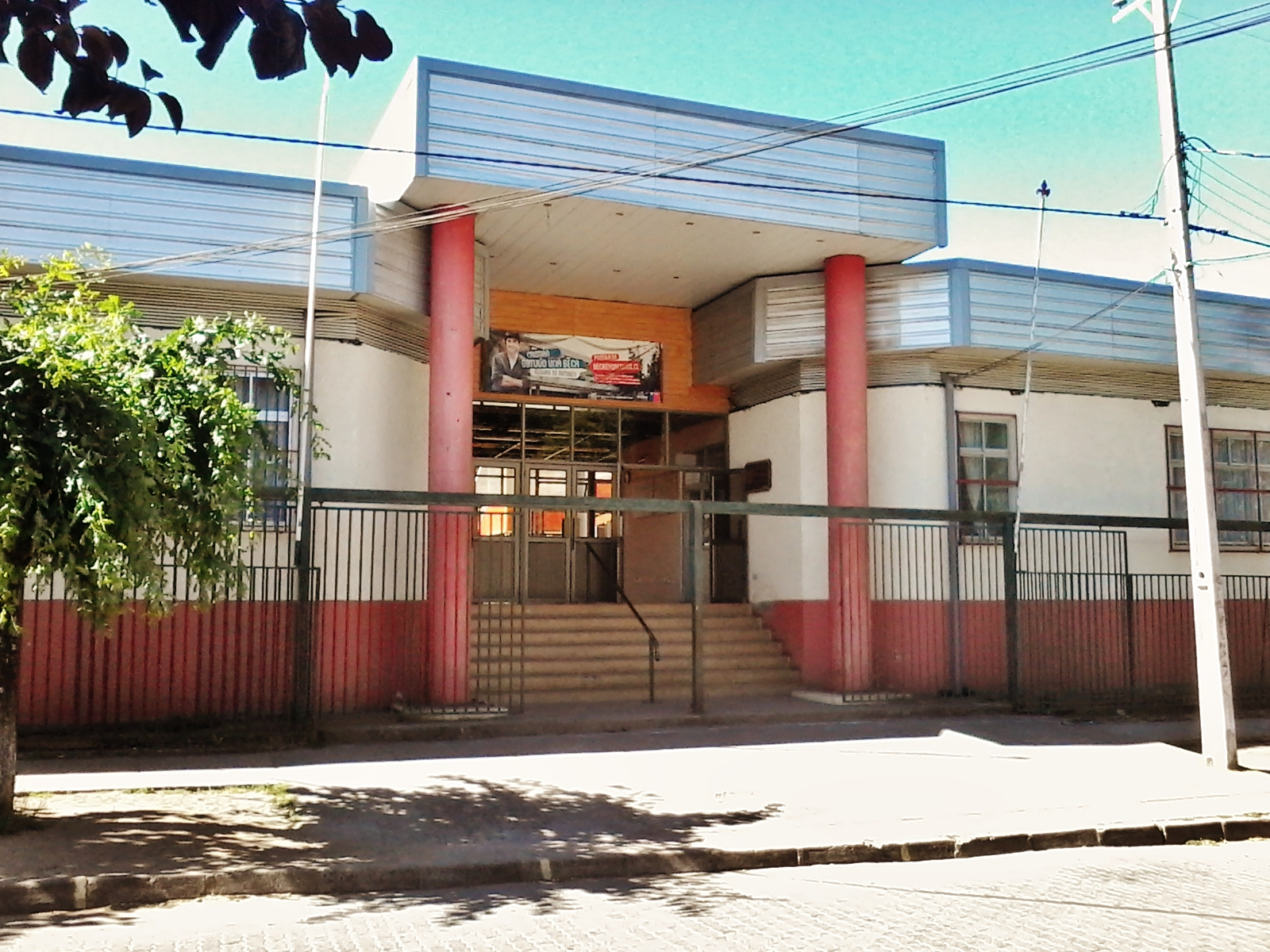 Instituto San Sebastian Medio